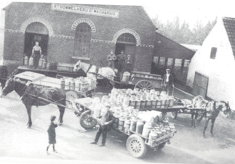 Voormalige Melkerij Sint-Macharius - Dentergemstraat - Wontergem - Deinze - Oost-Vlaanderen - België